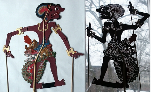 Selandir, Raja (König) von Selan (Srilanka), Wayang Kulit Sasak